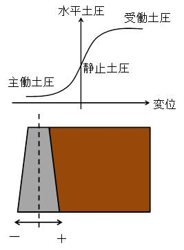 変位と土圧の関係